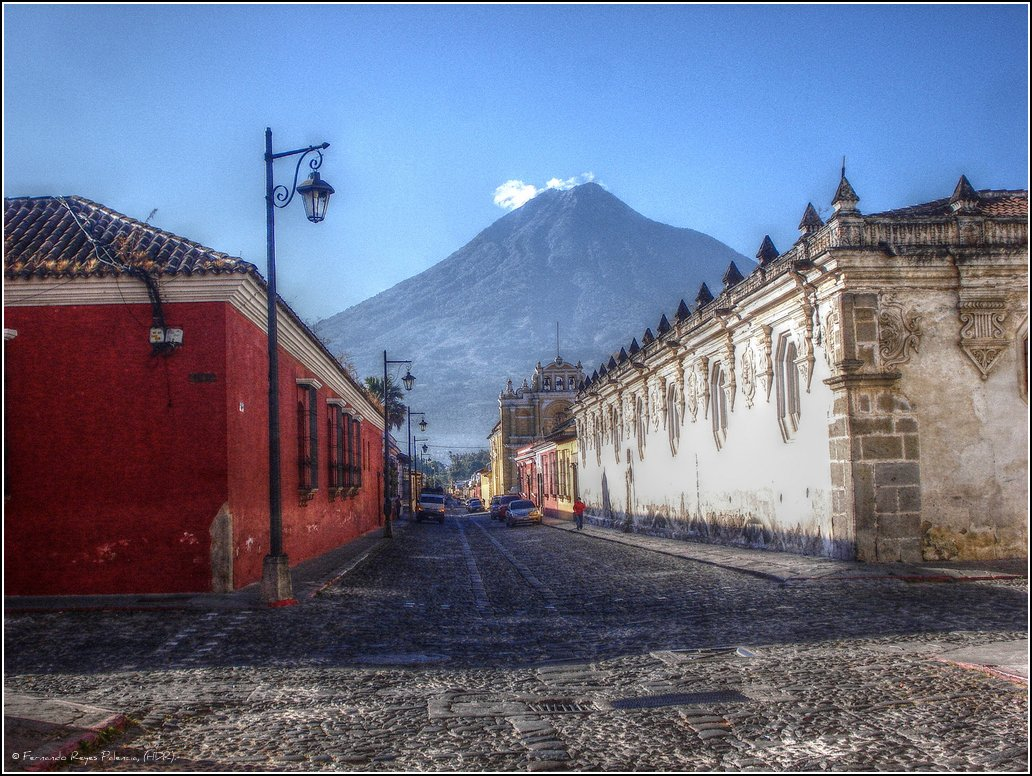 Una mañana muy fresca en la ciudad de la Antigua Guatemala